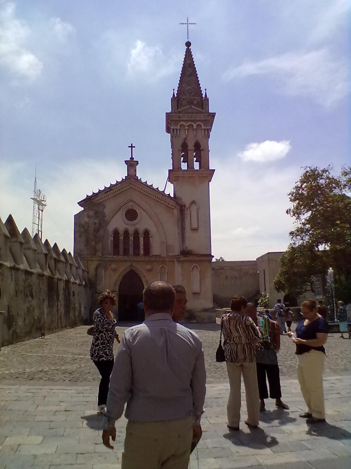 Capilla de Santa Maria que forma parte del conjunto de la Catedral de Cuernavaca